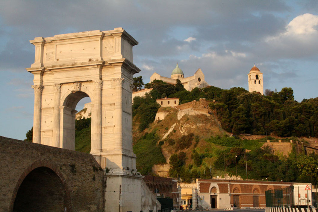 Arco di Traiano This is a photo of a monument which is part of cultural heritage of Italy.